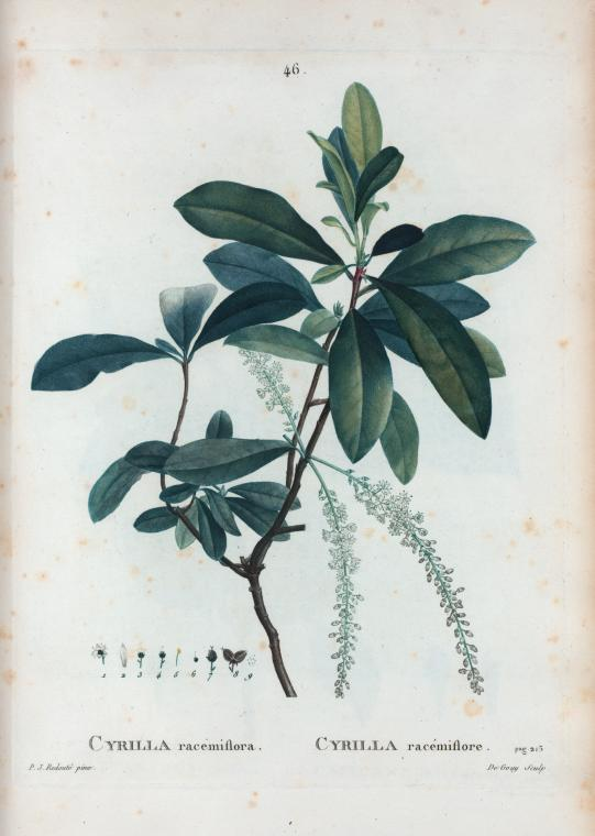 Cyrilla racemiflora = Cyrilla racémiflore.